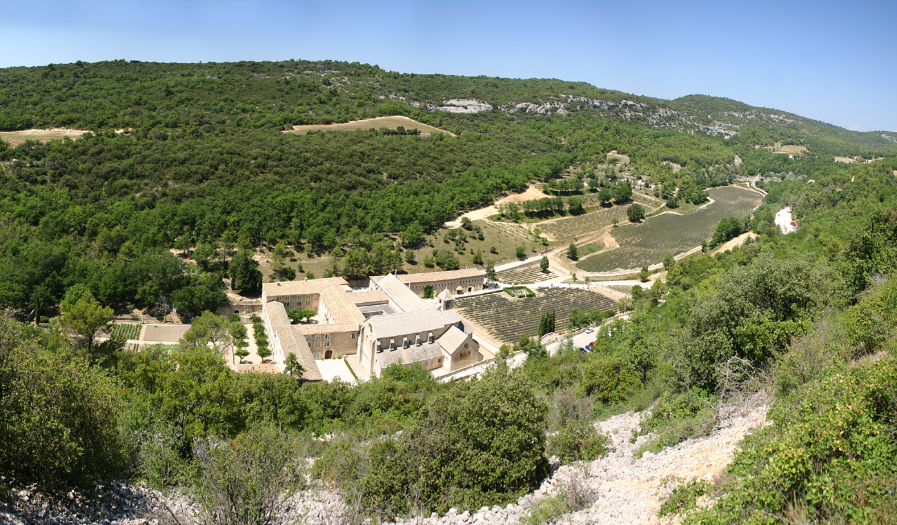 Zisterzienserabtei Senanque, Provence, Frankreich